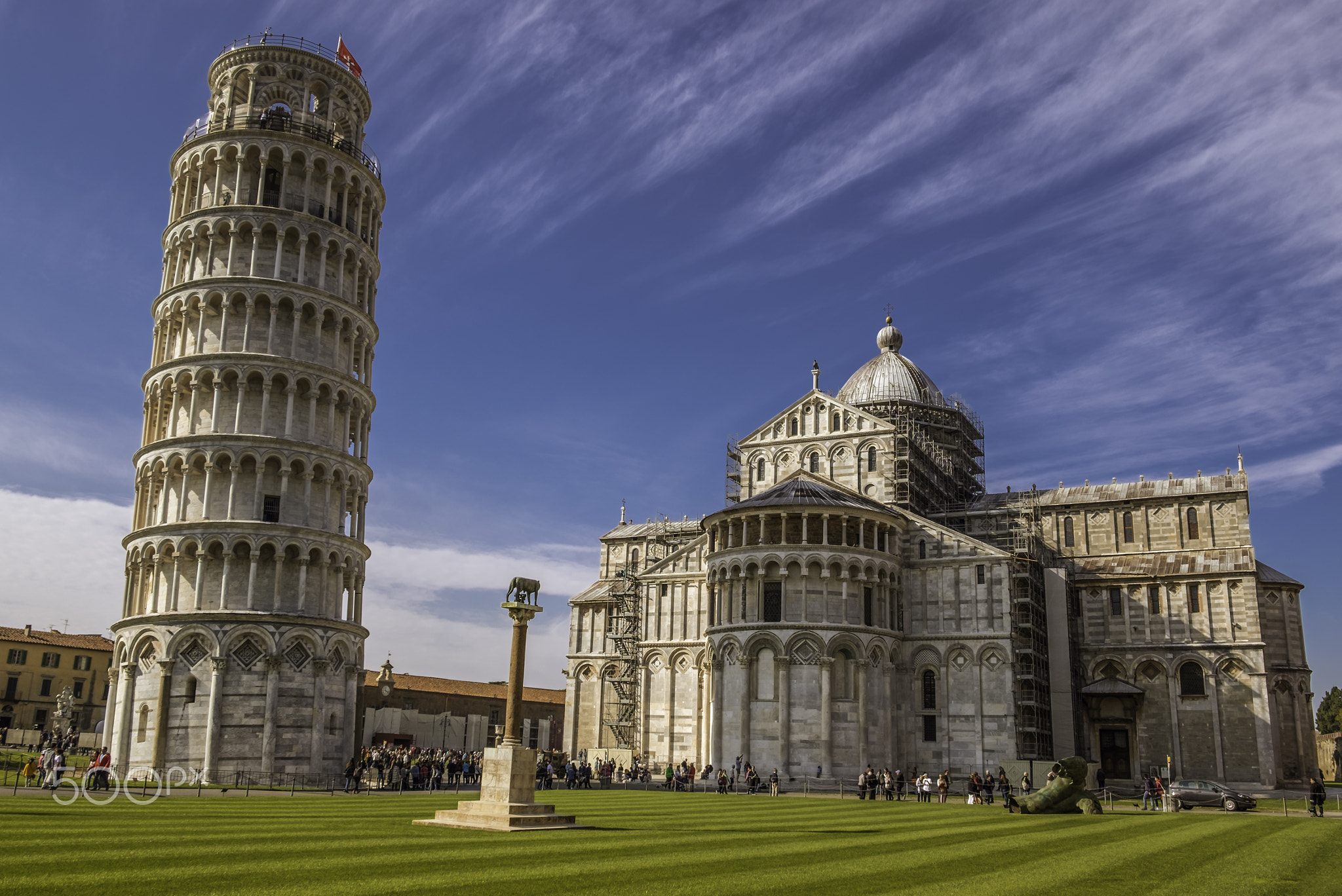 500px provided description: Piazza dei Miracoli - Pisa [#people ,#travel ,#italy ,#cityscape ,#cathedral ,#horizontal ,#tuscany ,#pisa ,#Duomo ,#Piazza dei Miracoli ,#Pisa tower]